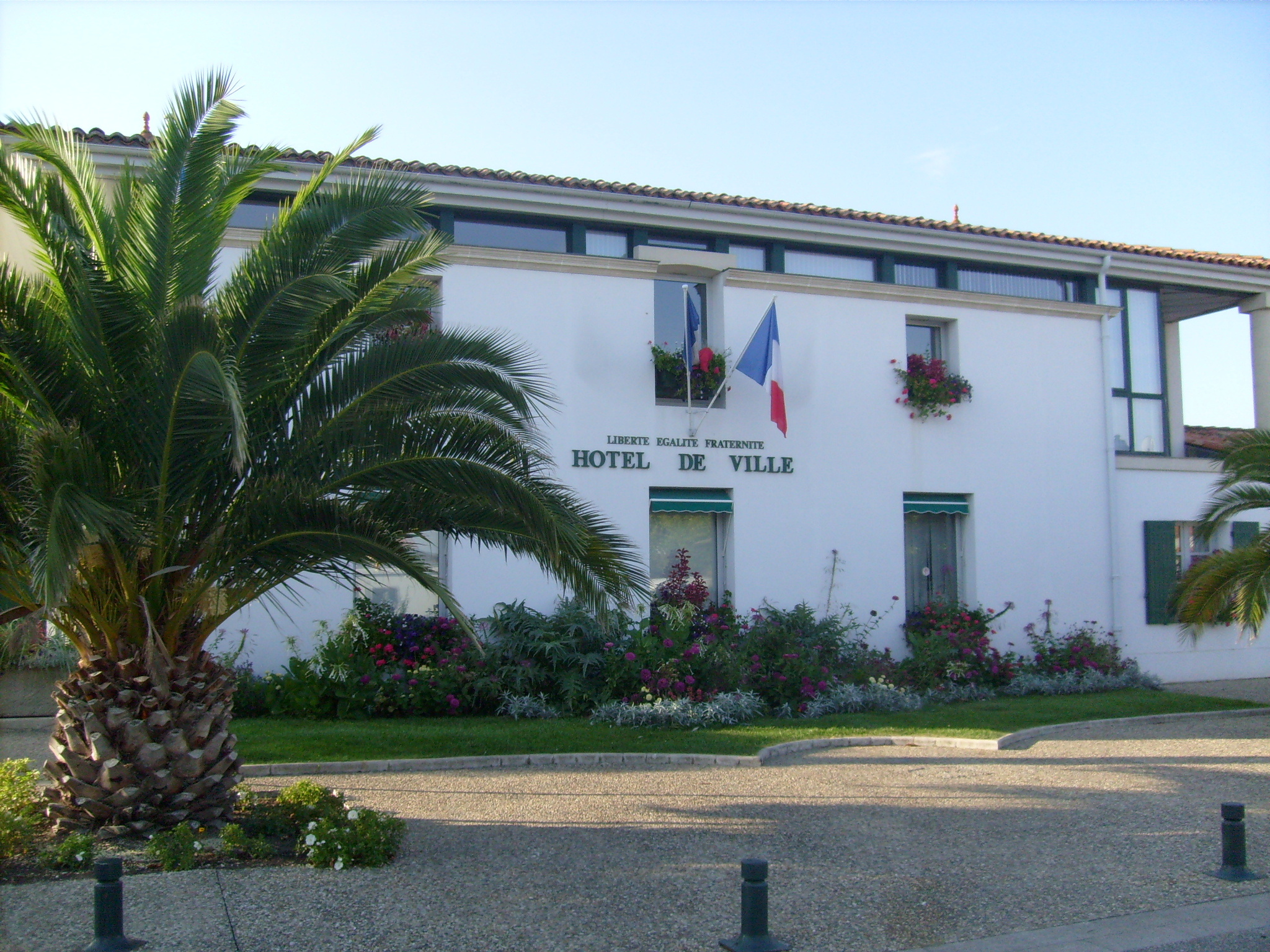 L'hôtel de ville de Dolus-d'Oléron